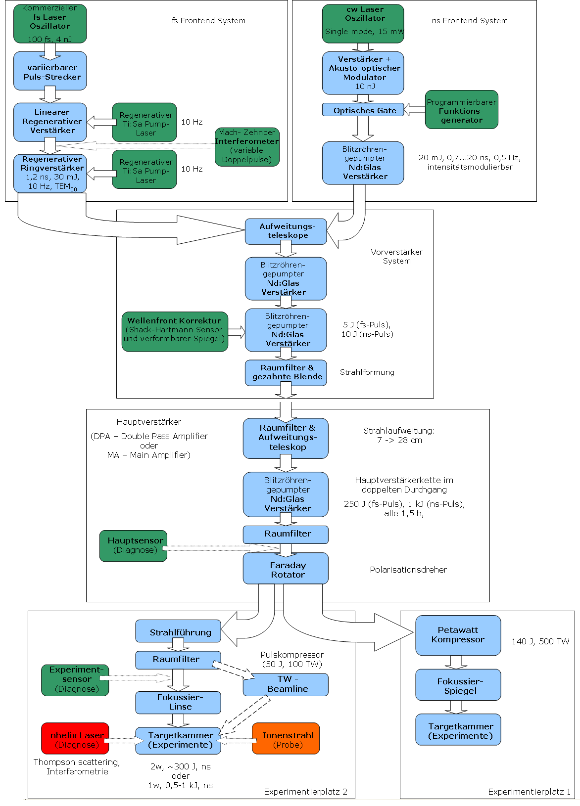 Schematischer Aufbau des PHELIX Laser Systems (Stand Juni 2009)